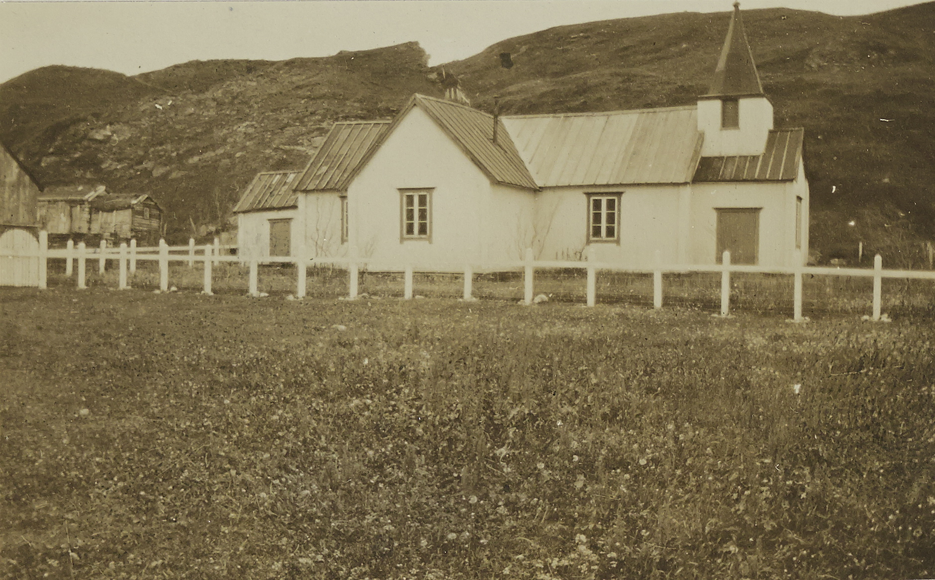 Loppas tidligere kirke, fra 1740-tallet, brent i 1944. Foto: Alfred Obert Hagn, fra Riksantikvarens samling i Digitalt museum.